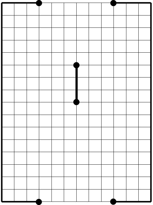 Модельное футбольное поле с первым ходом игрока. Вариант 1. Из издания "Мациевский С. В. Математическая культура. Игры: Учебное пособие. — Калининград: Изд-во Калининградского государственного университета, 2003. — 120 с., ил. — ISBN 5-88874-451-4. — Глава 4. Игры и головоломки. § 2. Футбол."